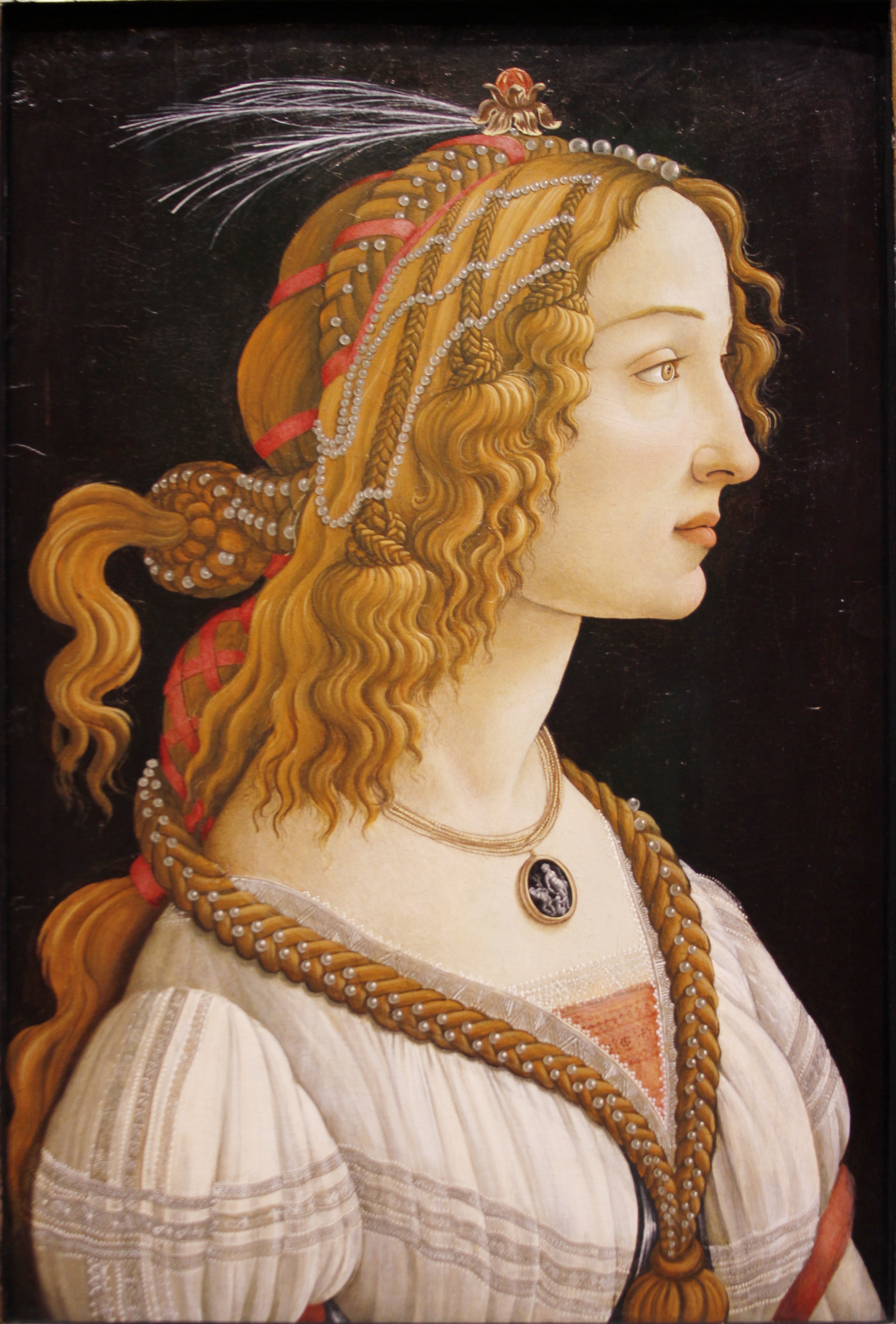 Städel - Frankfurt am Main - Germany